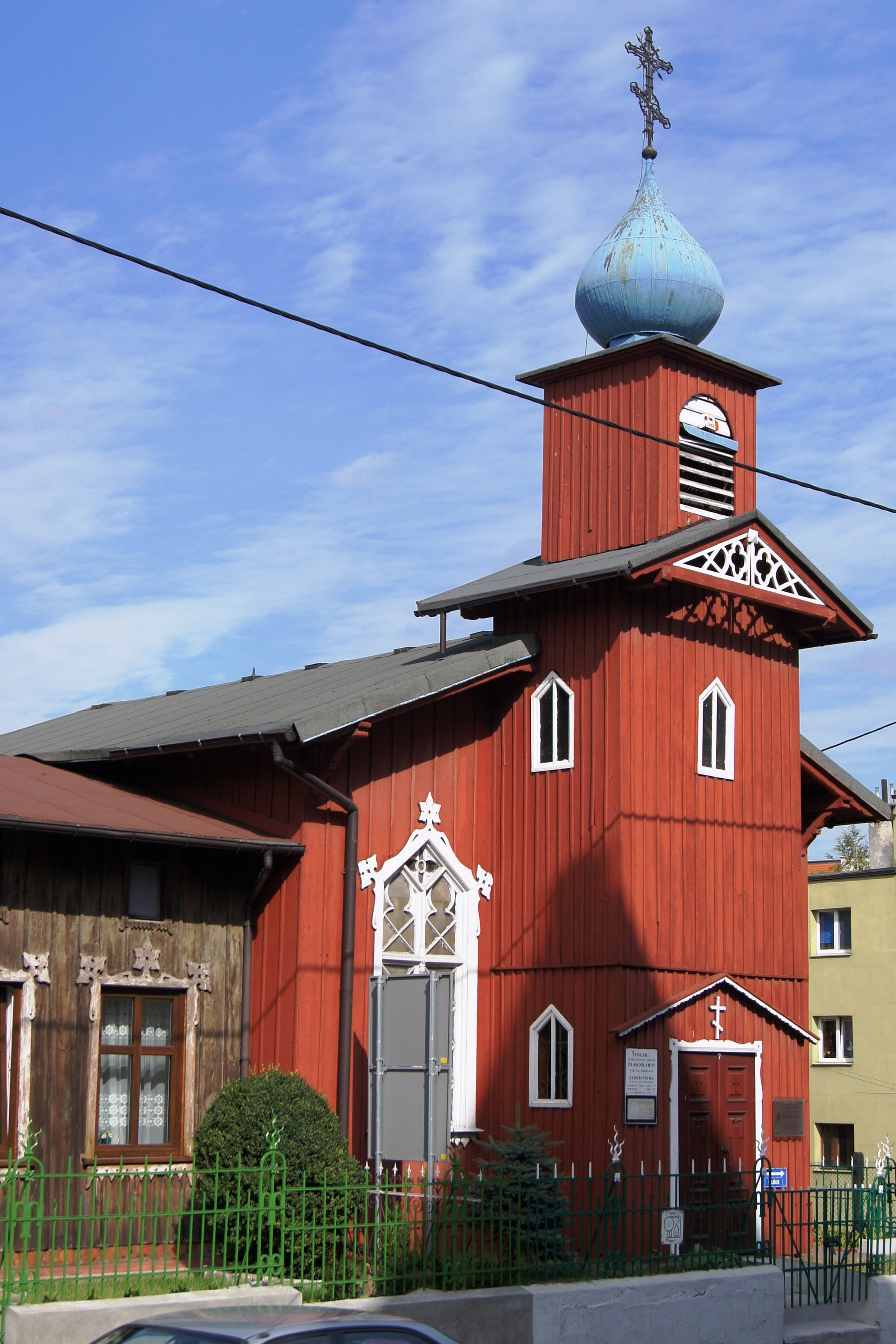 Toruń Mokre, ul. Podgórna - dawny kościół luterański, obecnie cerkiew prawosławna p.w. św. Mikołaja, 1886 (zabytek nr rejestr. A/81/1-2)